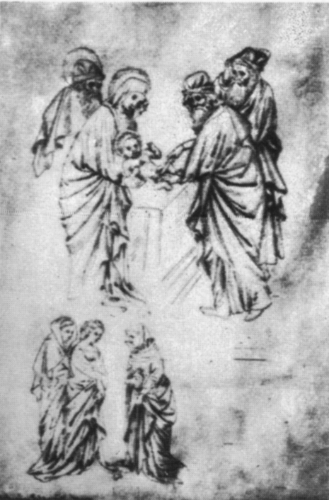 Pisanello, disegni, louvre 421r.jpg